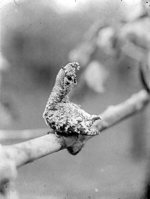 Repronegatief. In Indië kwamen vele soorten gierzwaluwen voor. De meest voorkomende waren de Salanganen, die op diverse plaatsen in de Archipel, Borneo daaronder begrepen, een bijzonder commerciële betekenis hadden. Het waren namelijk de bouwers van de zogeheten eetbare vogelnestjes. Deze nestjes werden vooral in grote aantallen aangetroffen op rotswanden (vaak in grotten), maar ook op huizen die soms zelfs met het oog daarop gebouwd waren. De nestjes bestaan uit speeksel van de zwaluwen, soms vermengd met plantendelen. De pluk van deze nesten werd vaak verpacht. Daarna werd het product aan de Chinezen verkocht, die het als lekkernij beschouwden. (P. Boomgaard, 2001). Jong van de gekuifde boomgierzwaluw op Borneo, die zich bij gevaar uitrekt, bol maakt en stil blijft zitten zodat hij op de boomtak lijkt en niet opvalt.